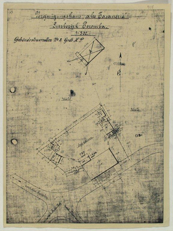 Mapa Bażantarni z XVIII wieku